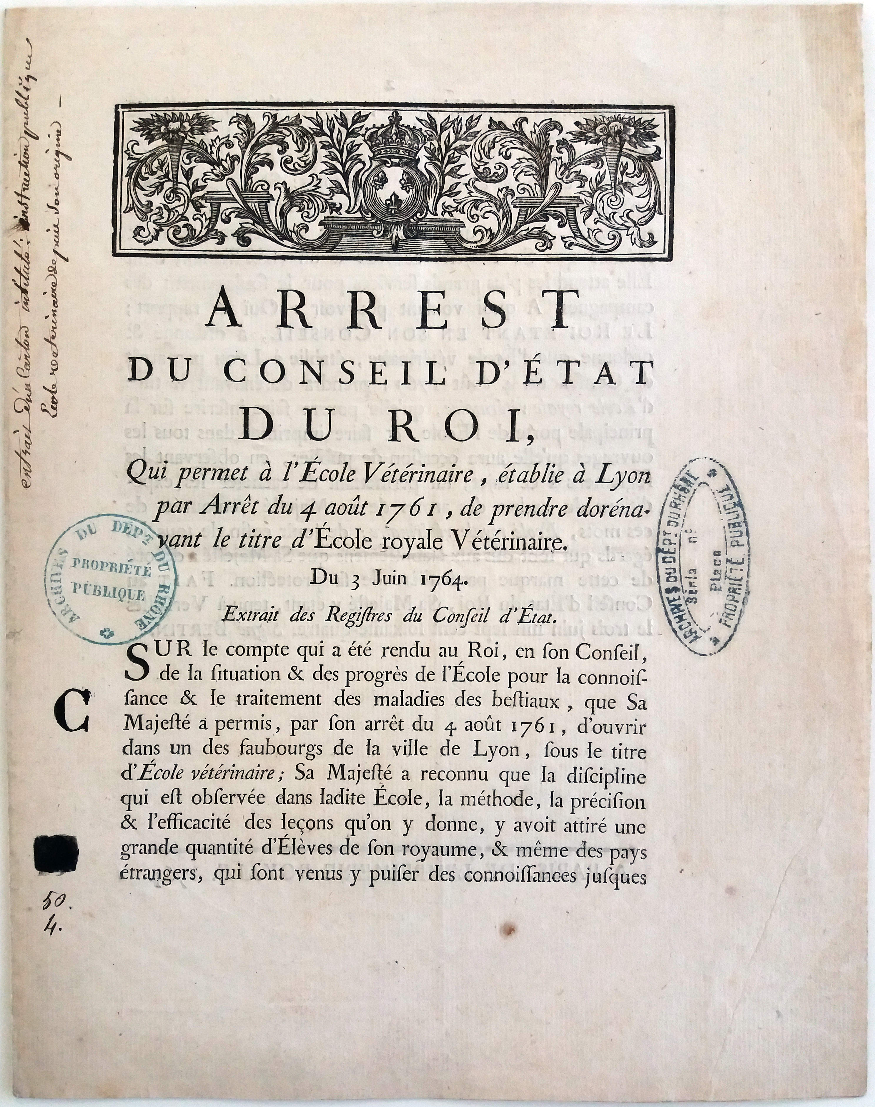 Arrêt du Conseil d'Etat du roi qui donne à l'Ecole Vétérinaire le titre d'Ecole royale Vétérinaire. Archives départementales du Rhône, cote : 1C 192.